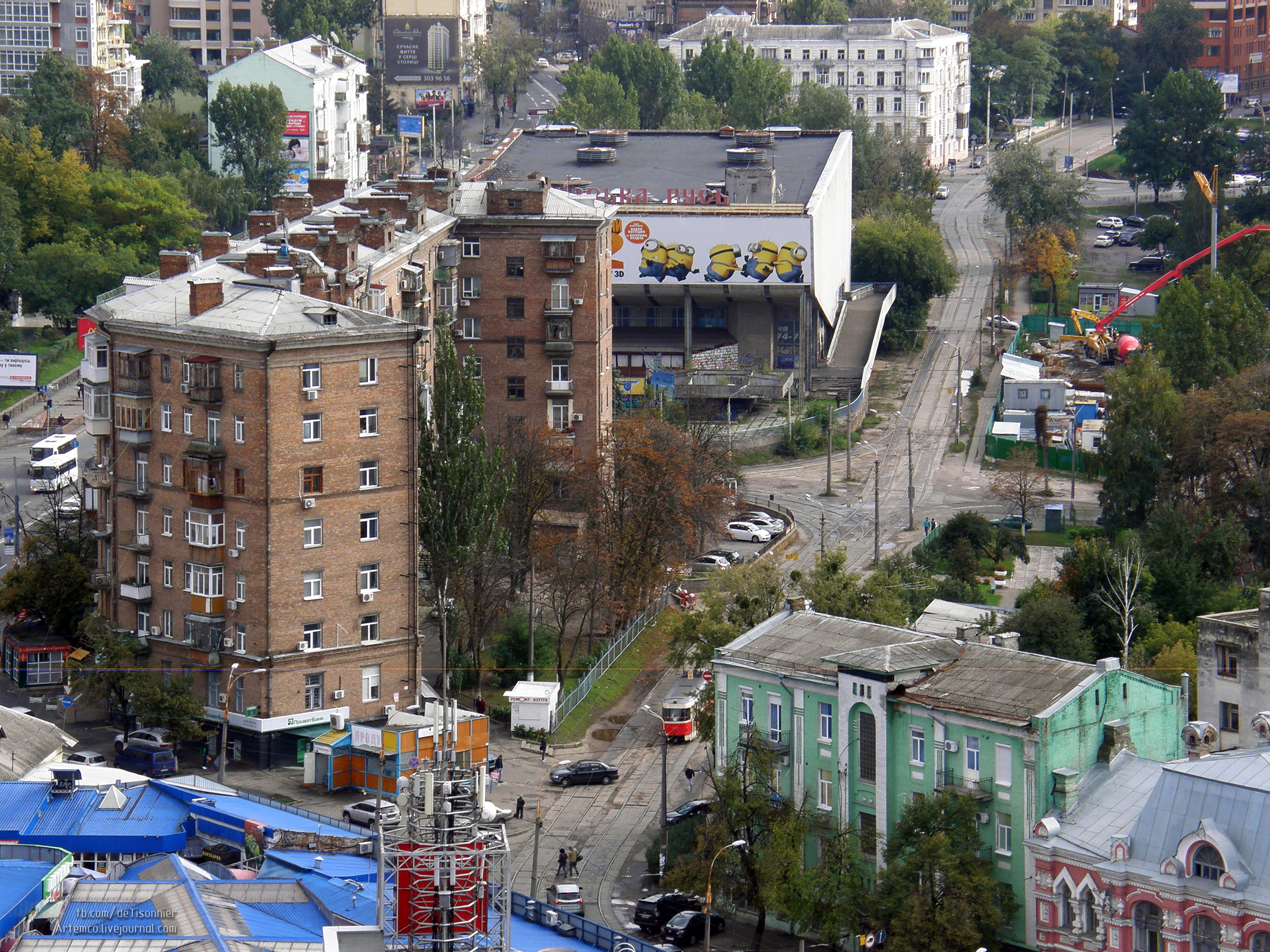 кінець вулиці Дмитрівської